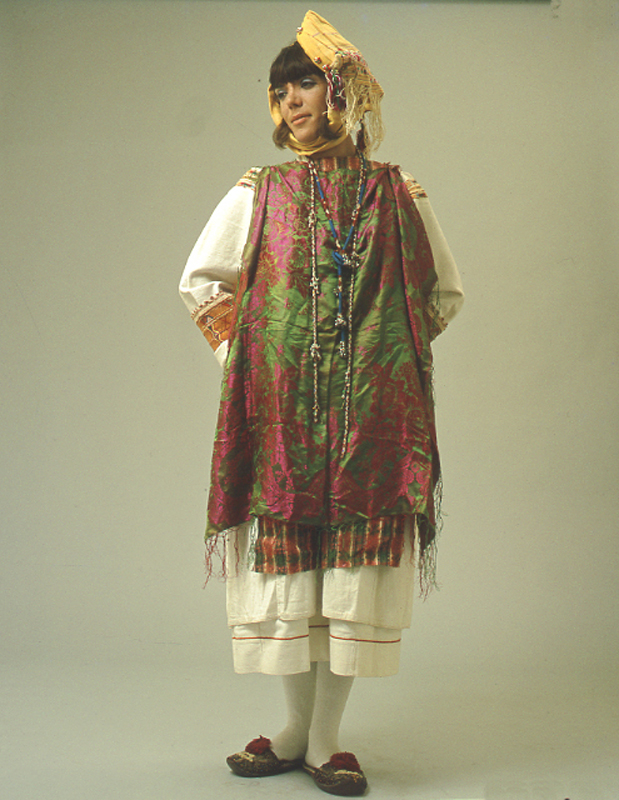 Γυναικεία φορεσιά από το Πυργί Χίου.Συλλογή Πελοποννησιακού Λαογραφικού Ιδρύματος, Ναύπλιο